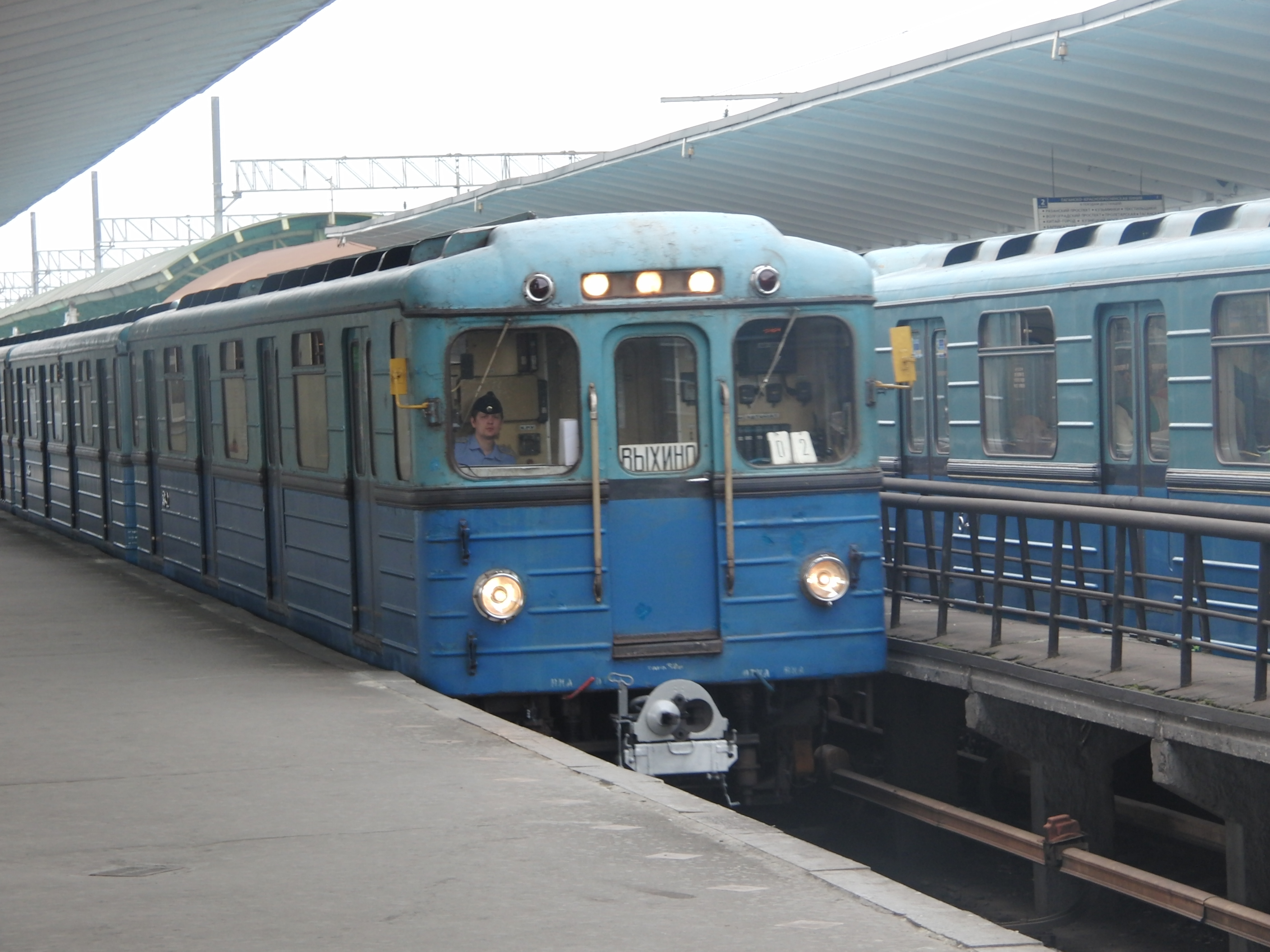 Vykhino (Выхино)